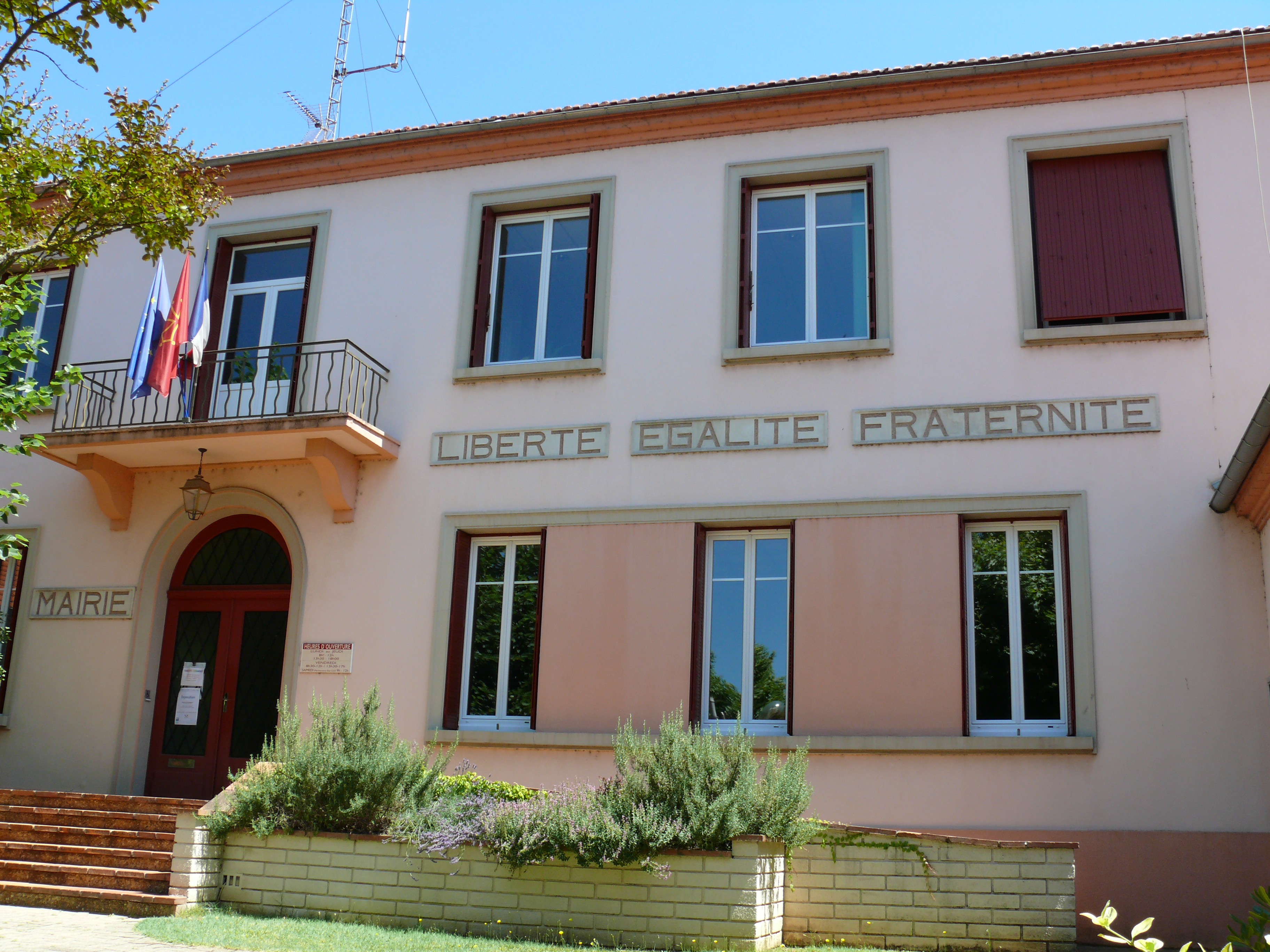 Saint-Juéry - Mairie